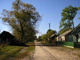 Wieś Derło